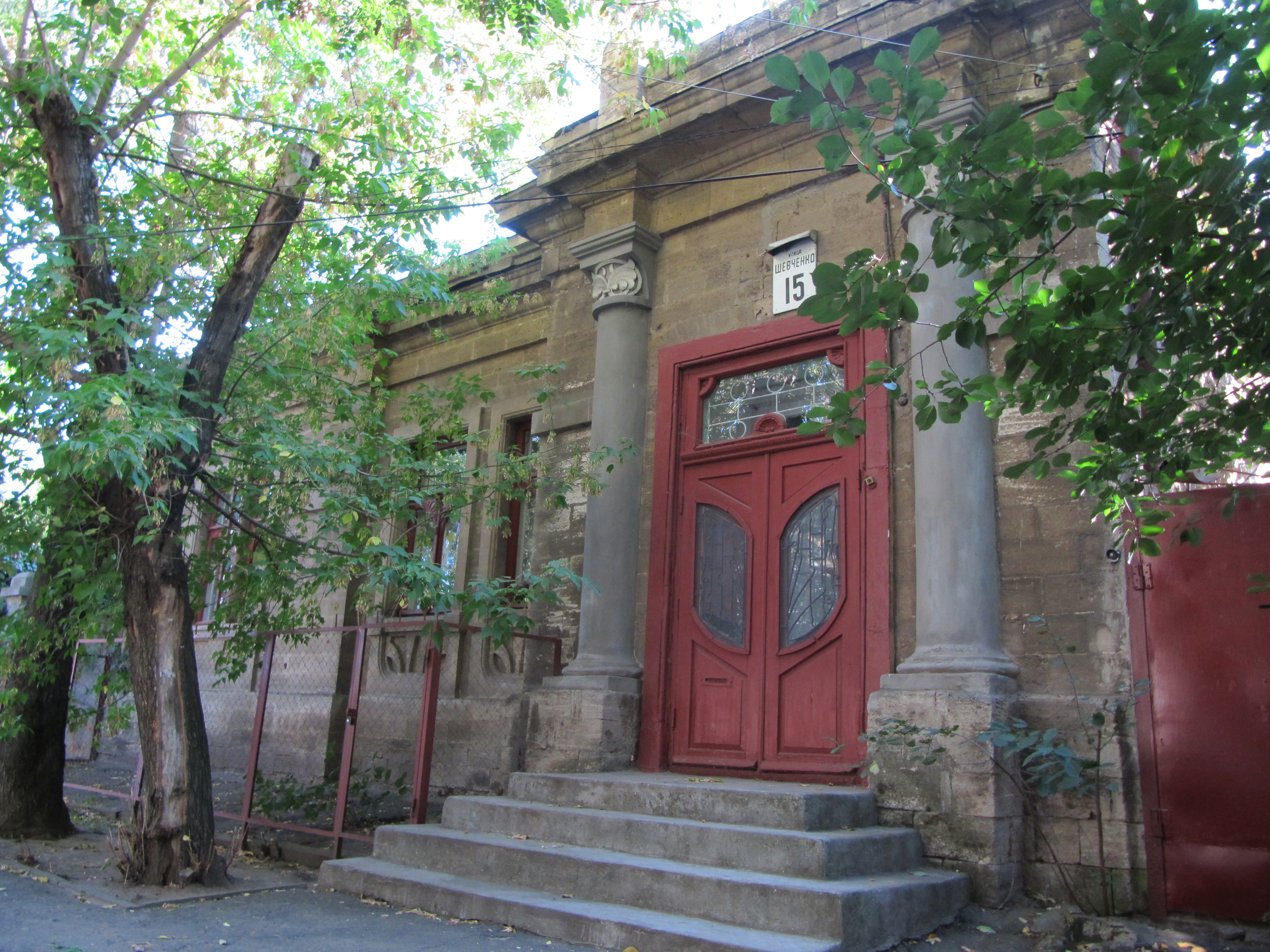 Житловий будинок-особняк на Шевченко, 15 (м. Миколаїв) Миколаївська весна у Вікіпедії